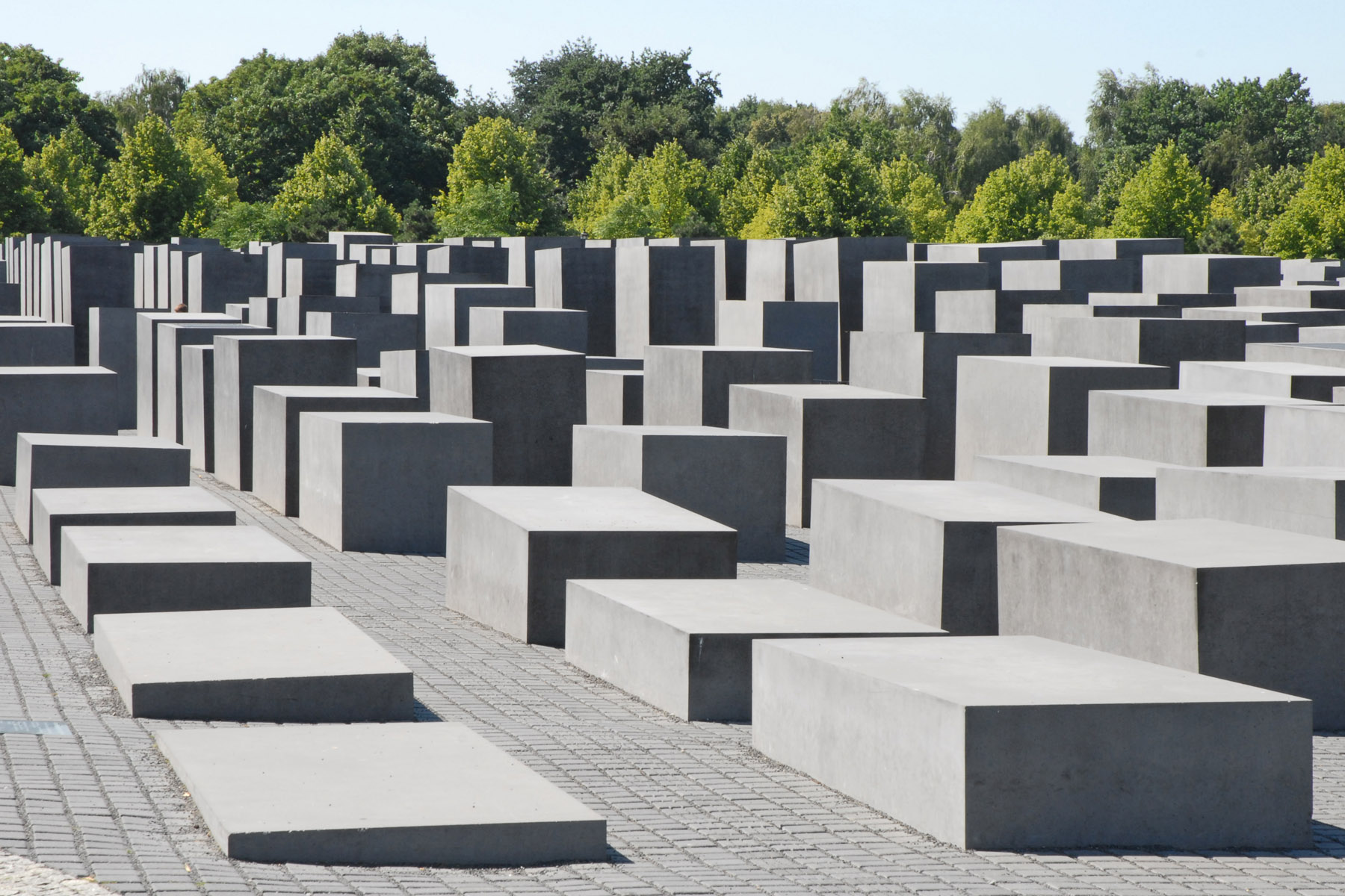 Les stèles du Mémorial aux juifs assassinés d'Europe (Berlin) The Memorial to the murdered Jews of Europe (Berlin) Le champ des 2.711 stèles du mémorial, situé près de la Potsdamer Platz, a une superficie de 10.073 m2. Il a été ouvert au public le 12 mai 2005. Il comprend un centre d'information qui présente la politique d'extermination menée par les nazis de 1933 à 1945